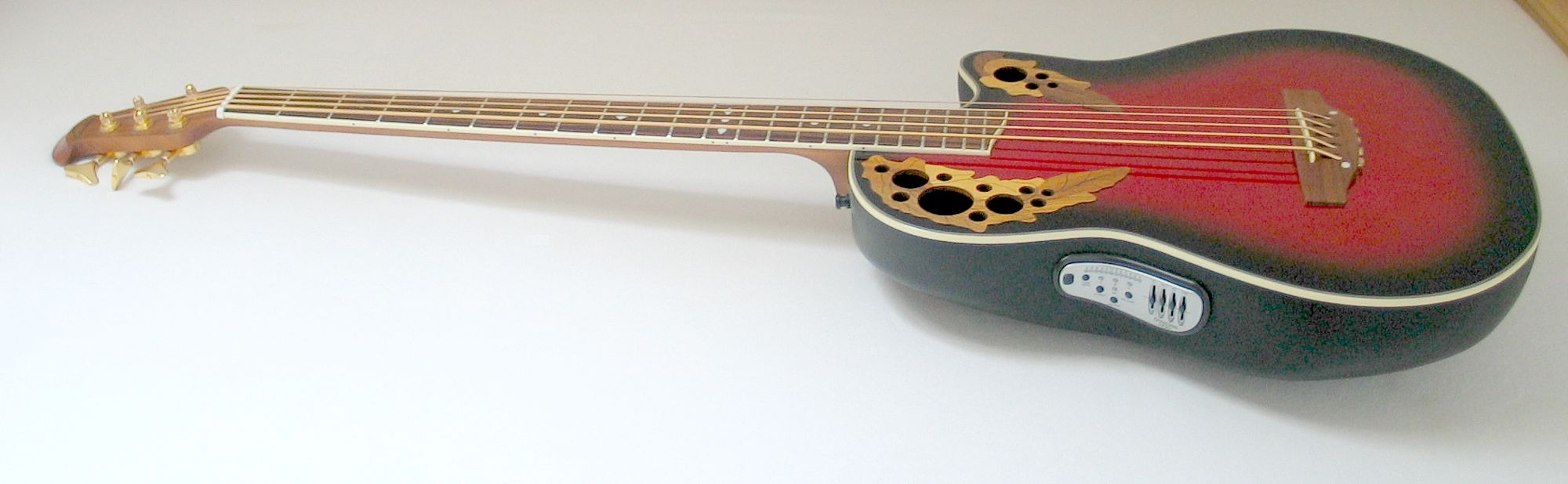 Electro-acoustic guitar